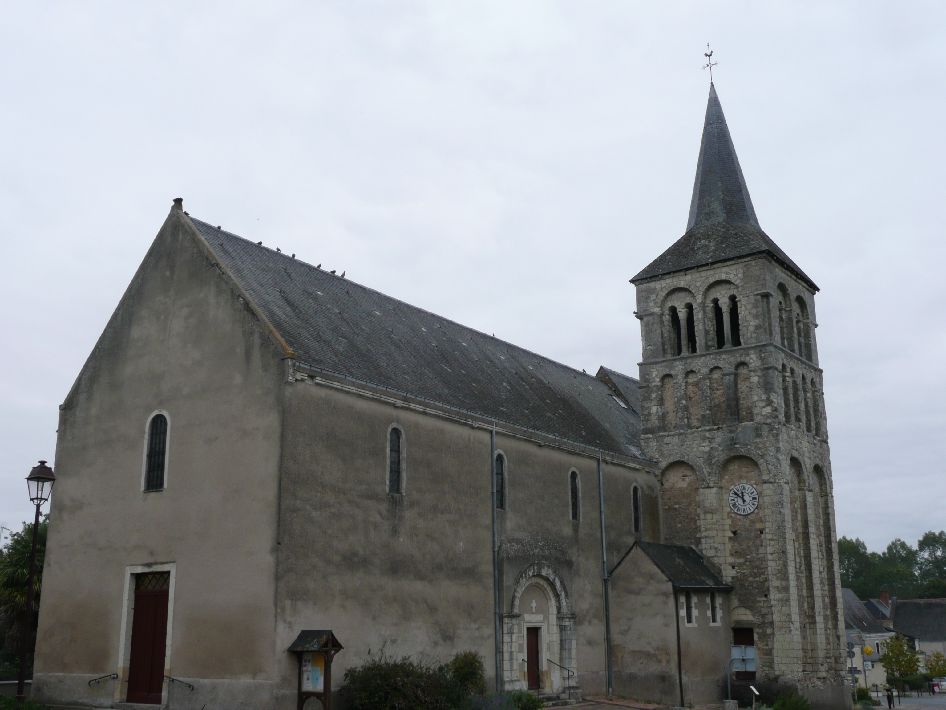 Villevêque - Eglise .